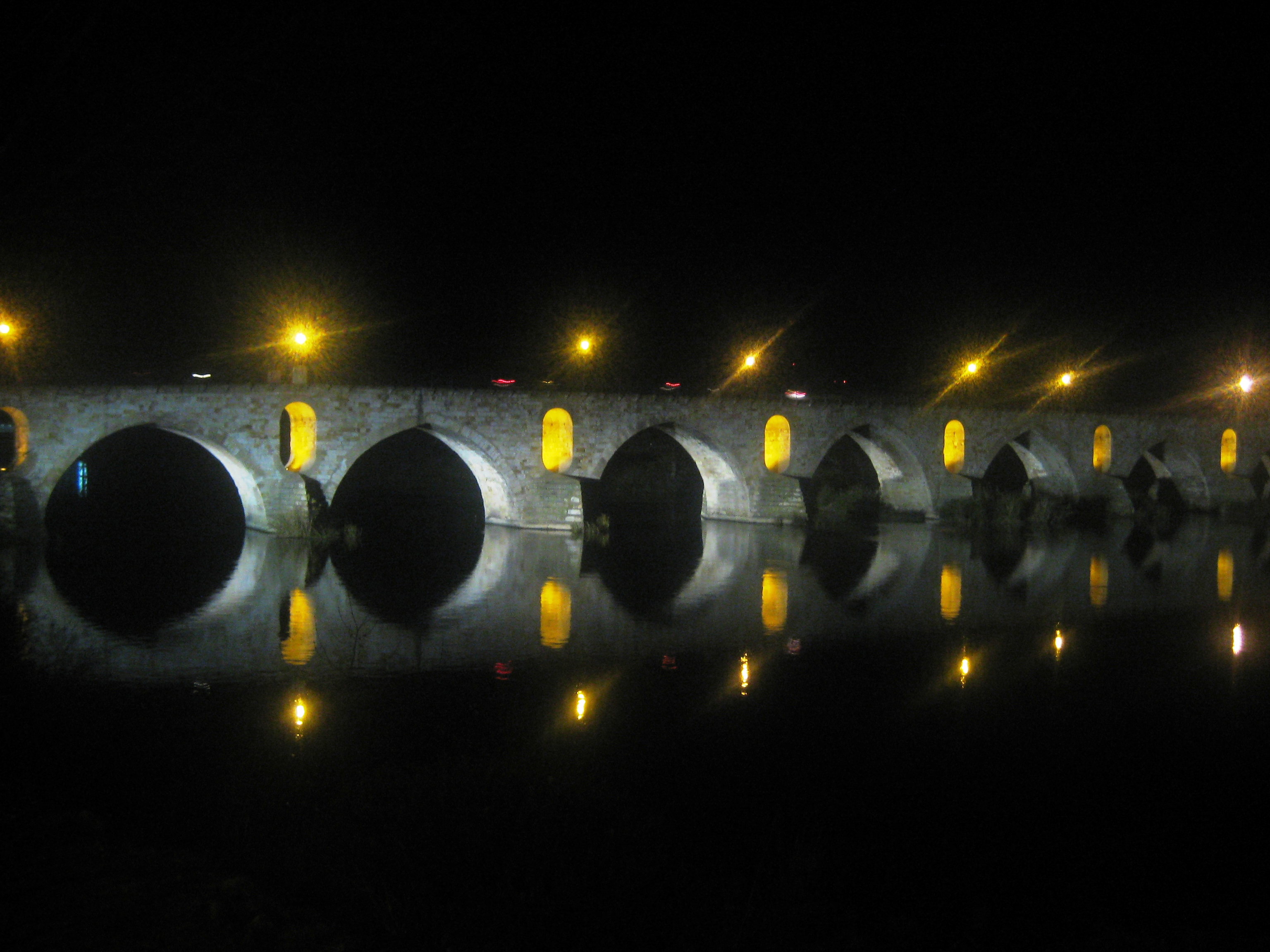 Vista nocturna del Puente de Piedra de Zamora